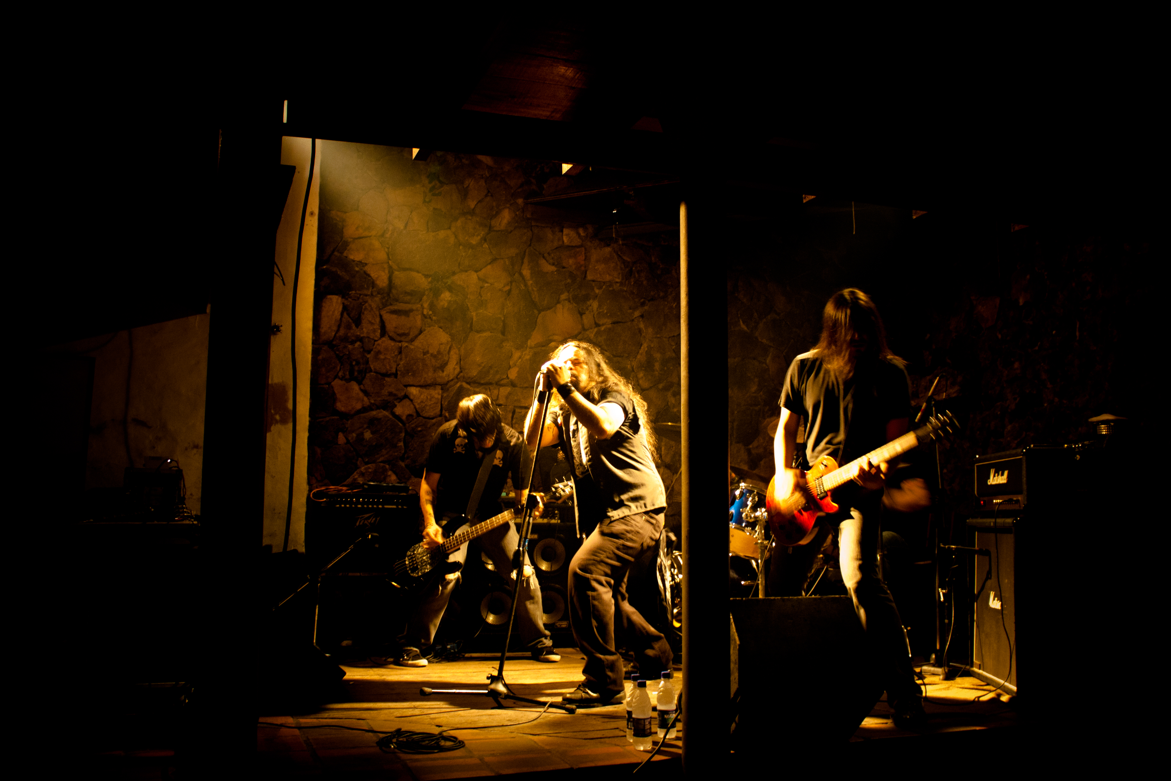 The Profane, banda de de death & roll de Paraguay, en un concierto en el Pub Asunceno La Viola.